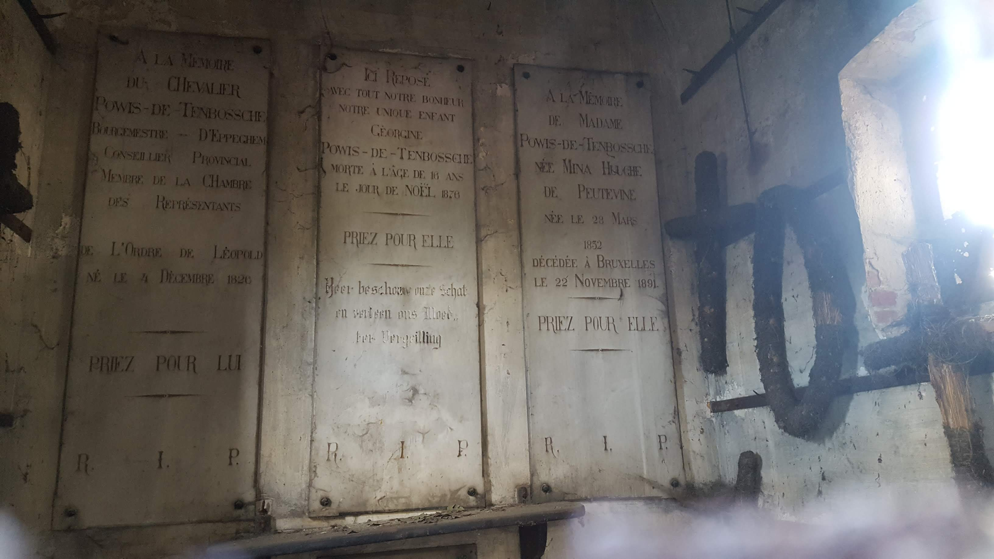 Binnenzijde grafkapel op kerkhof van Eppegem